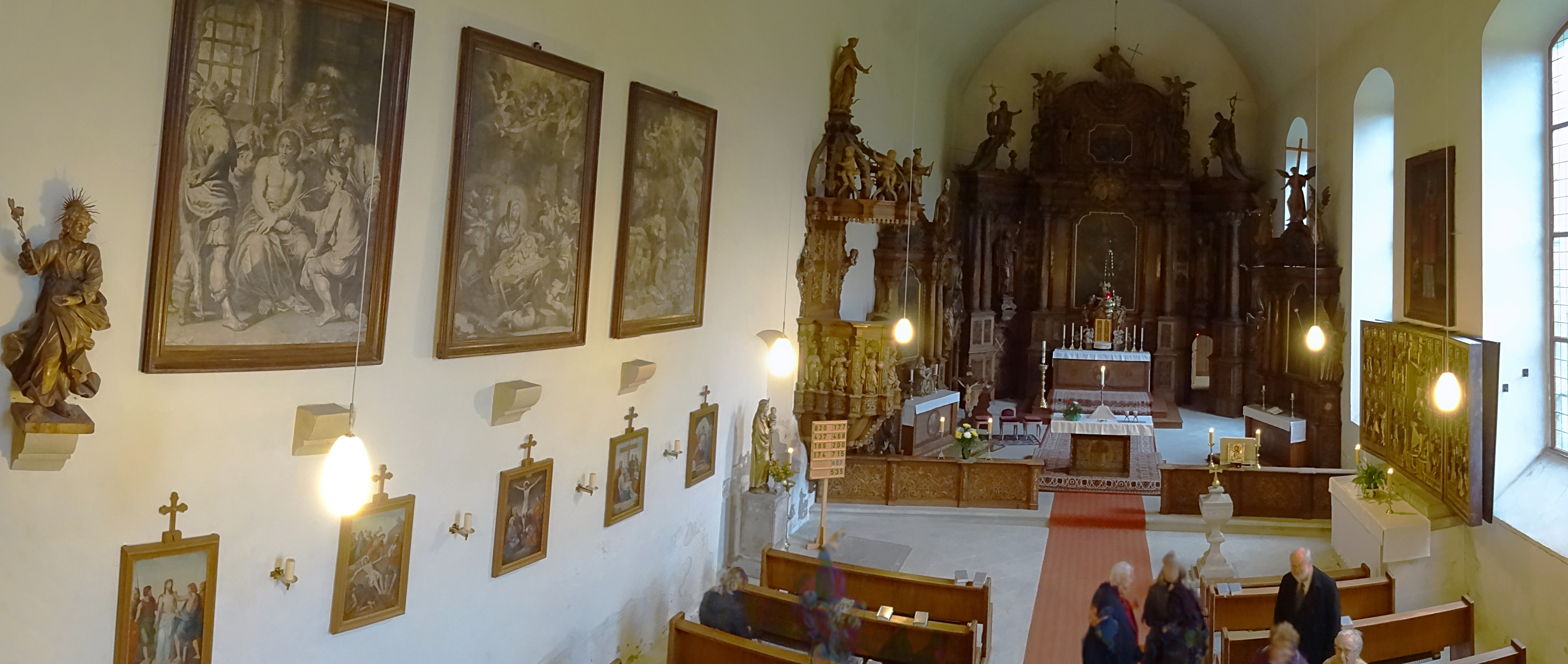 Innenraum Panorama der Klosterkirche St. Andreas zu Meyendorf